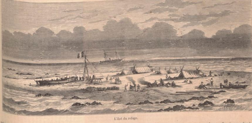 Naufrage de l'aviso Duroc le 13 août 1856; l'îlot du refuge, gravure publiée dans le Monde illustré du 4 juillet 1857